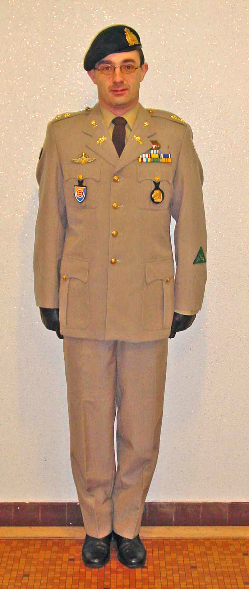 Lëtzebuerger Arméi Uniform Tenue S2E